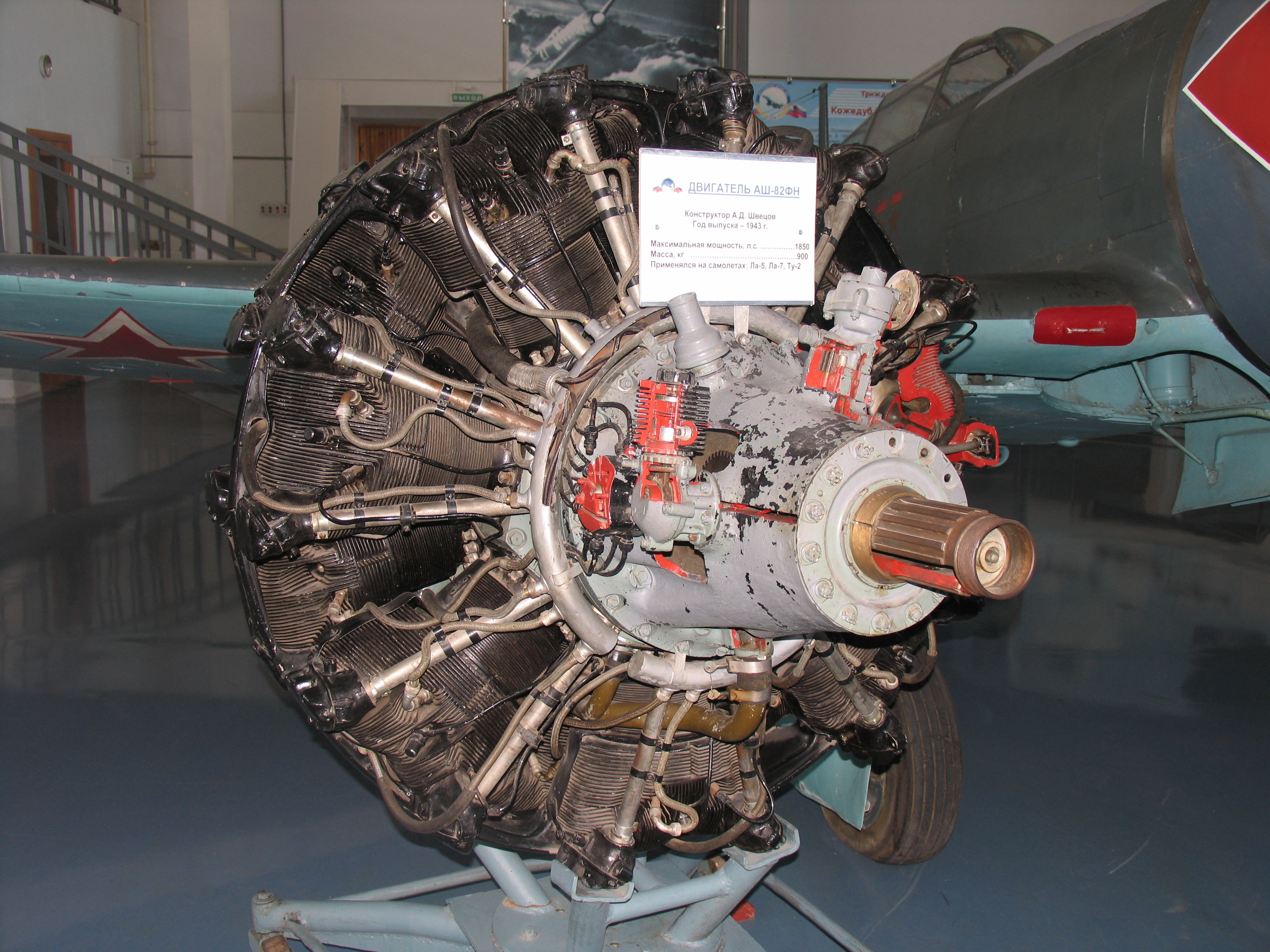 Двигатель АШ-82ФН. Музей ВВС.